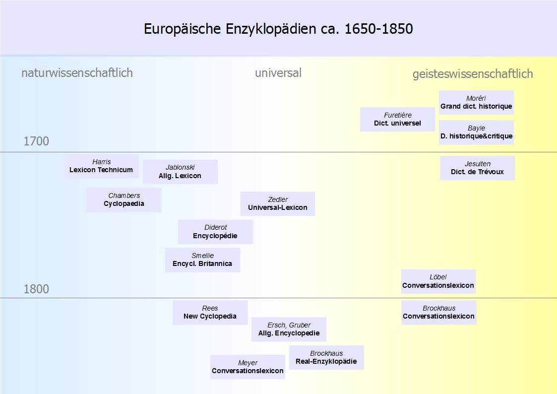 Europäische Enzyklopädien ca. 1650–1850 nach ihrer inhaltlichen Balance